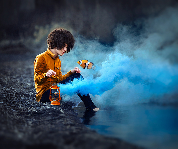 Autorretrato de Ronny García